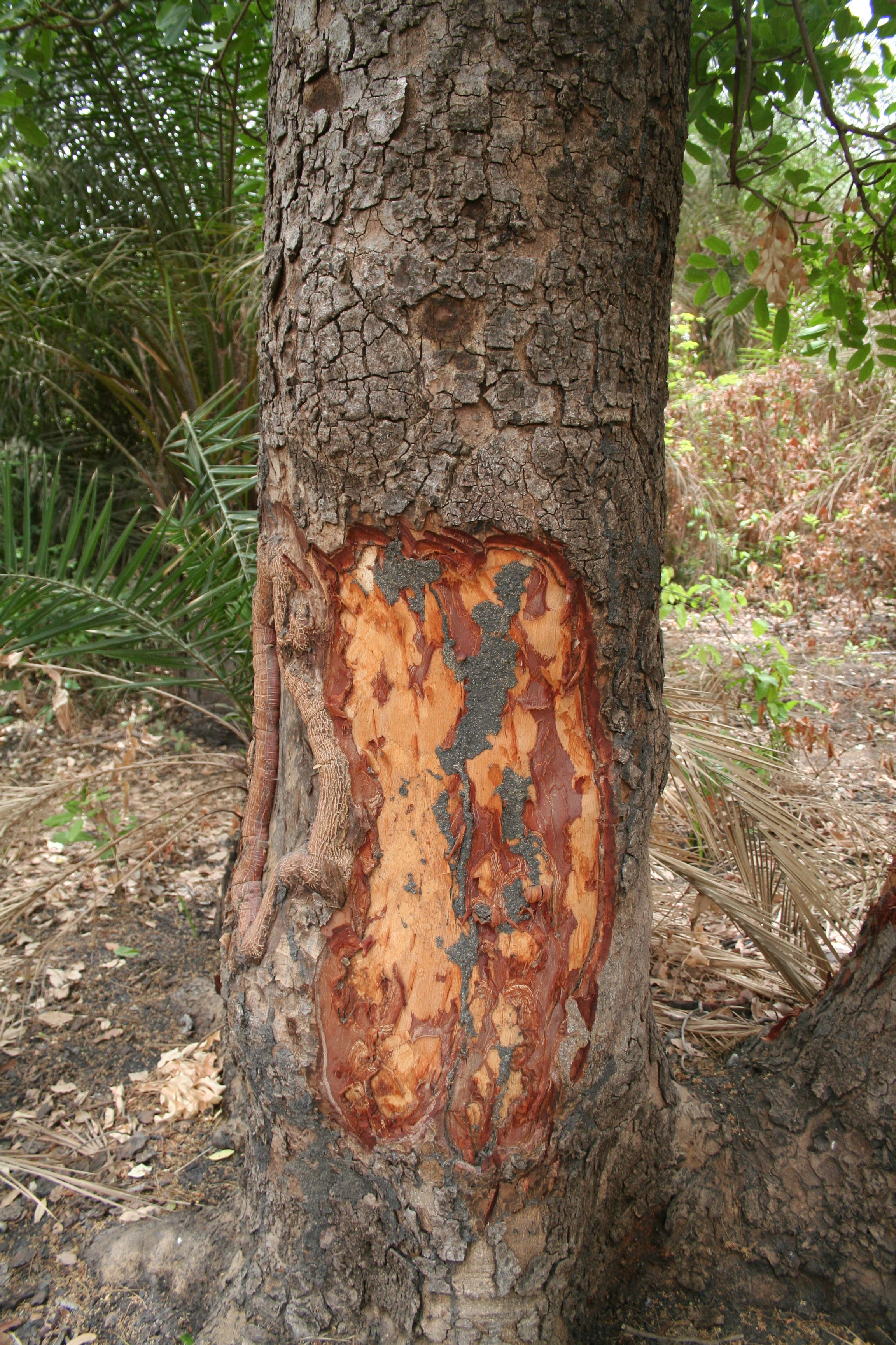 Khaya senegalensis, F.Cl. de Patako, Senegal. Bark harvested for medicine.